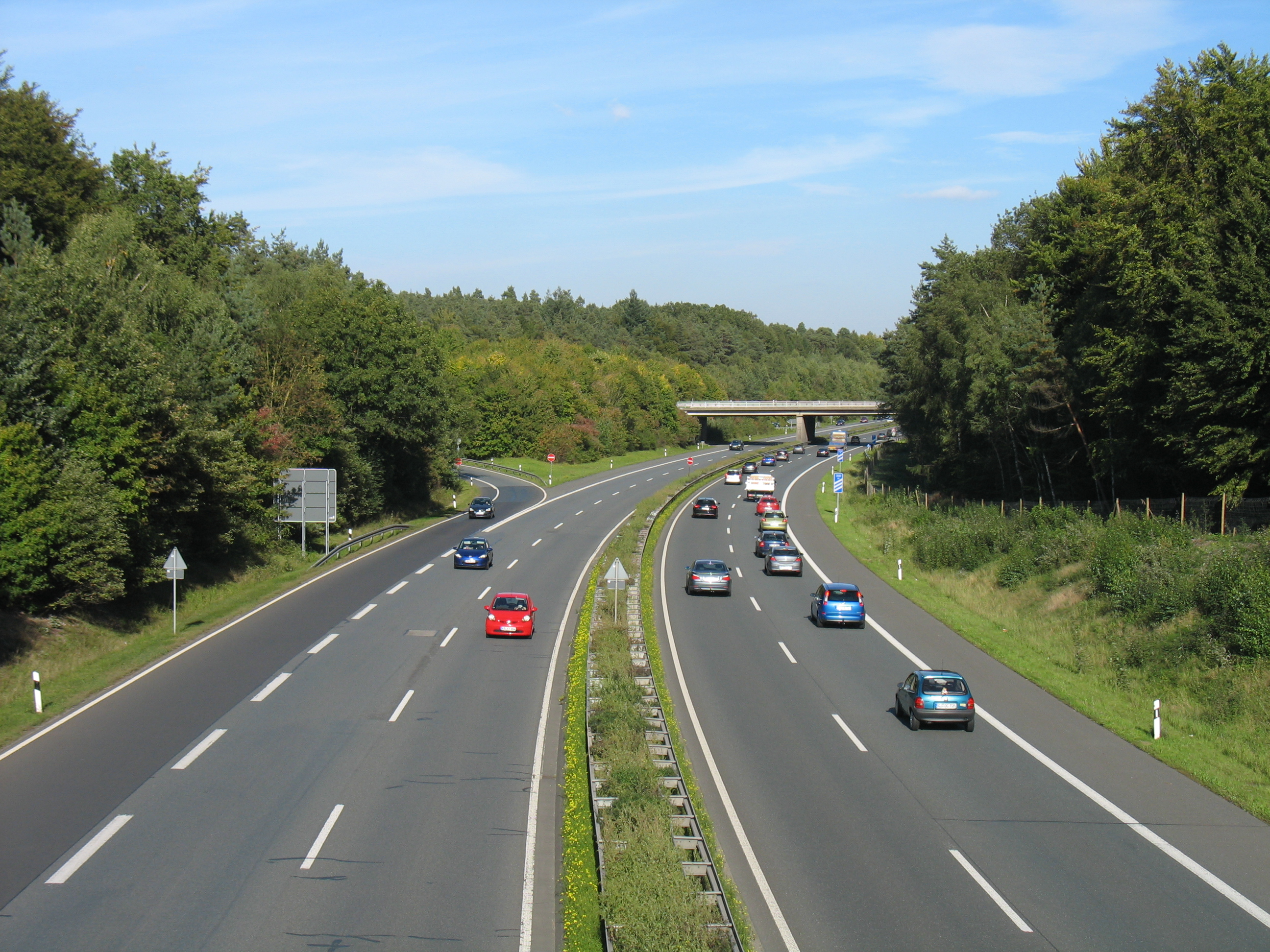 Bundesautobahn A 485 und Anschlußstelle Bergwerkswald bei Gießen in Form eines Autobahndreiecks.